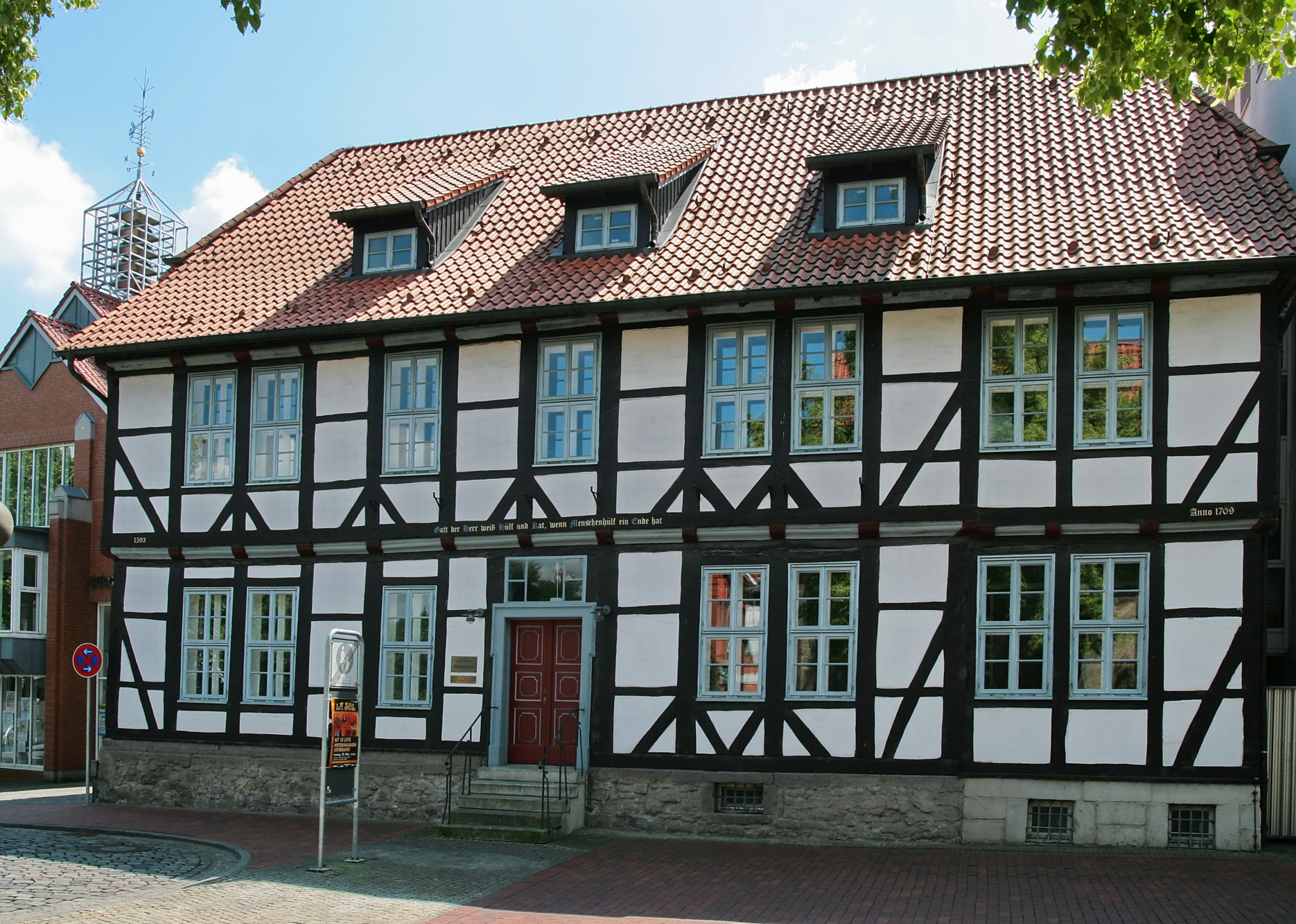 Fachwerkhaus in Wunstorf, Niedersachsen, Deutschland. Es ist das Haus Stiftstraße 2.